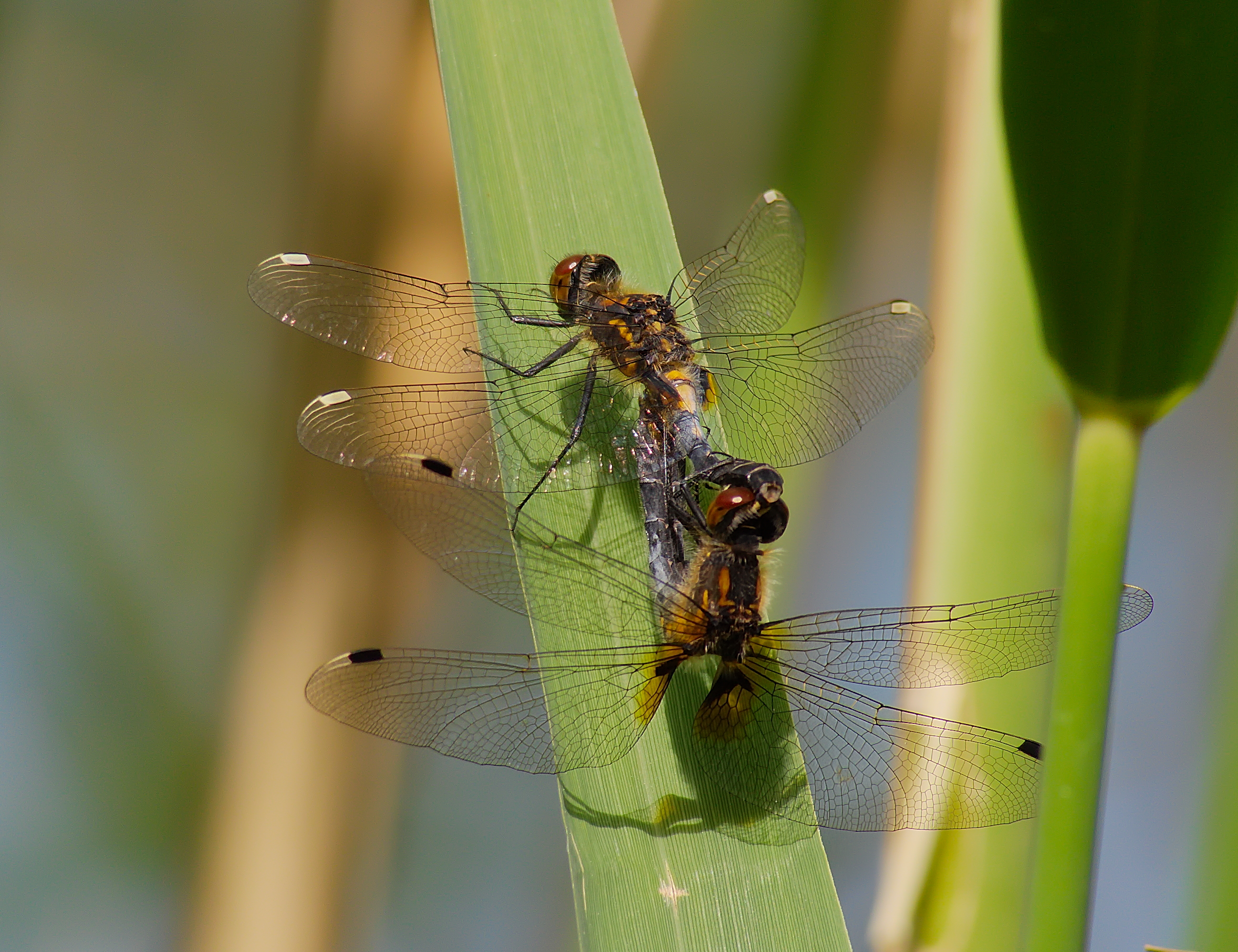 Zierliche Moosjungfer - Leucorrhinia caudalis, Paarungsrad. Aufgenommen in Mannheim am Karlsternweiher im Käfertaler Wald, Baden-Württemberg, Deutschland.